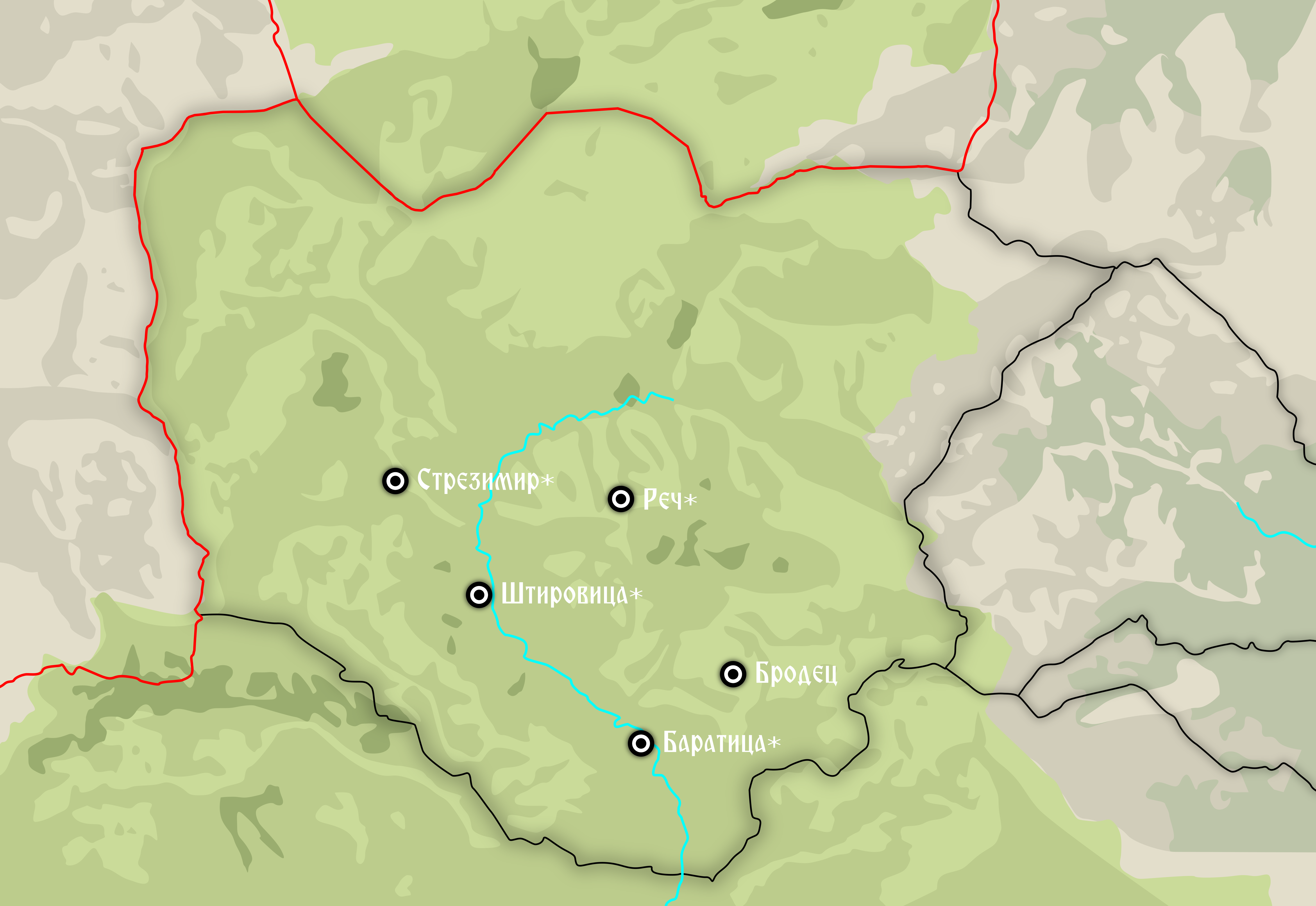 Атар Бродец и околните ненаселени места